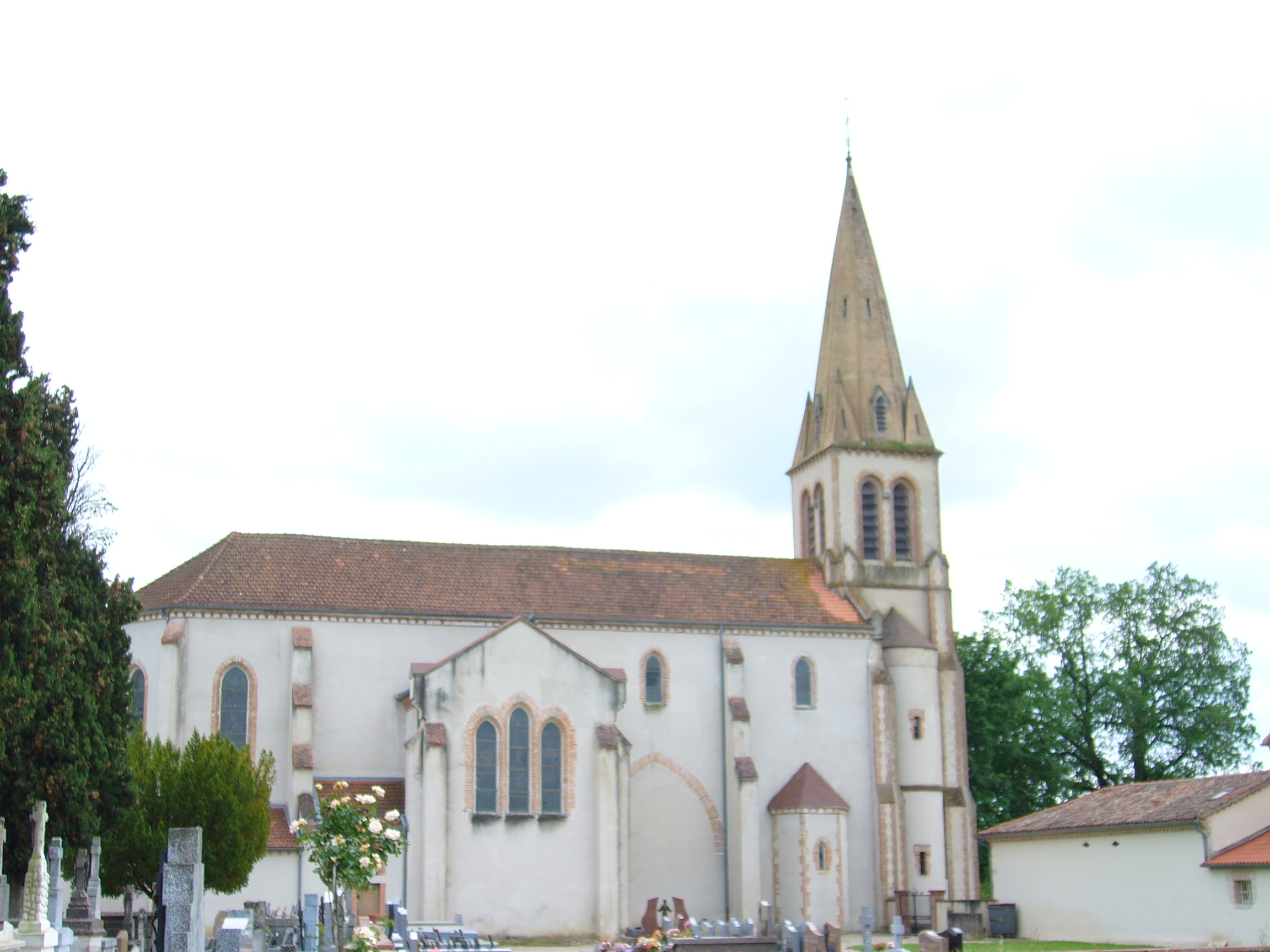 Eglise Damiatte Tarn, (81) France